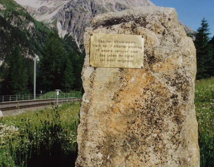 Gedenkstein am Bahnlehrpfad der Albulabahn